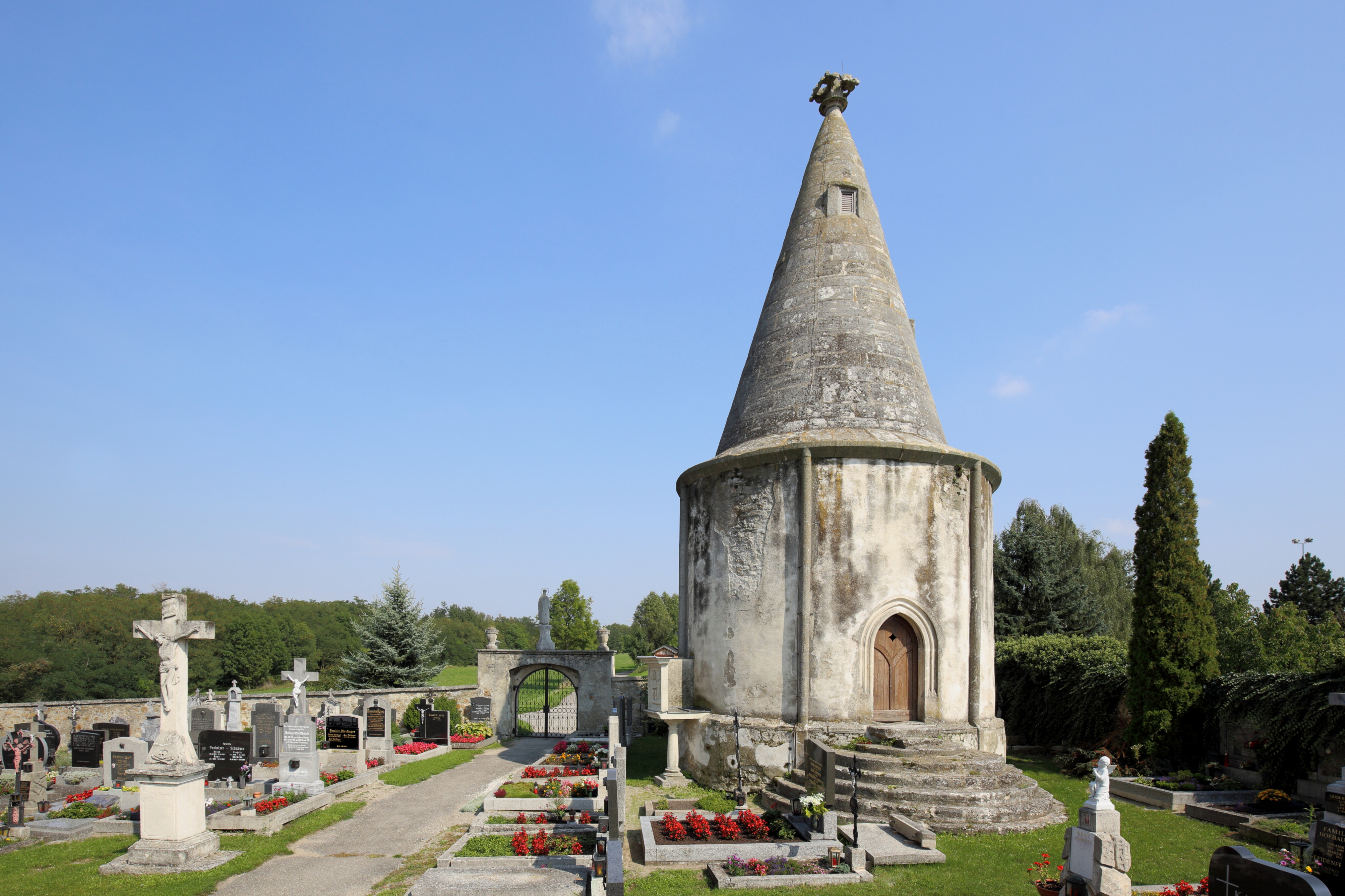 Karner in Burgschleinitz, ein Ortsteil der niederösterreichischen Marktgemeinde Burgschleinitz-Kühnring. Ein gotischer Rundbau aus dem Anfang des 15. Jahrhunderts mit einer romanischen Bausubstanz in der Sockelzone. An der nördlichen Außenseite des Karners befindet sich ein viereckige steinerne Kanzel (um 1580). 1978 wurden im Inneren Wandmalereien freigelegt, die aus der 1. Hälfte des 17. Jahrhunderts stammen.